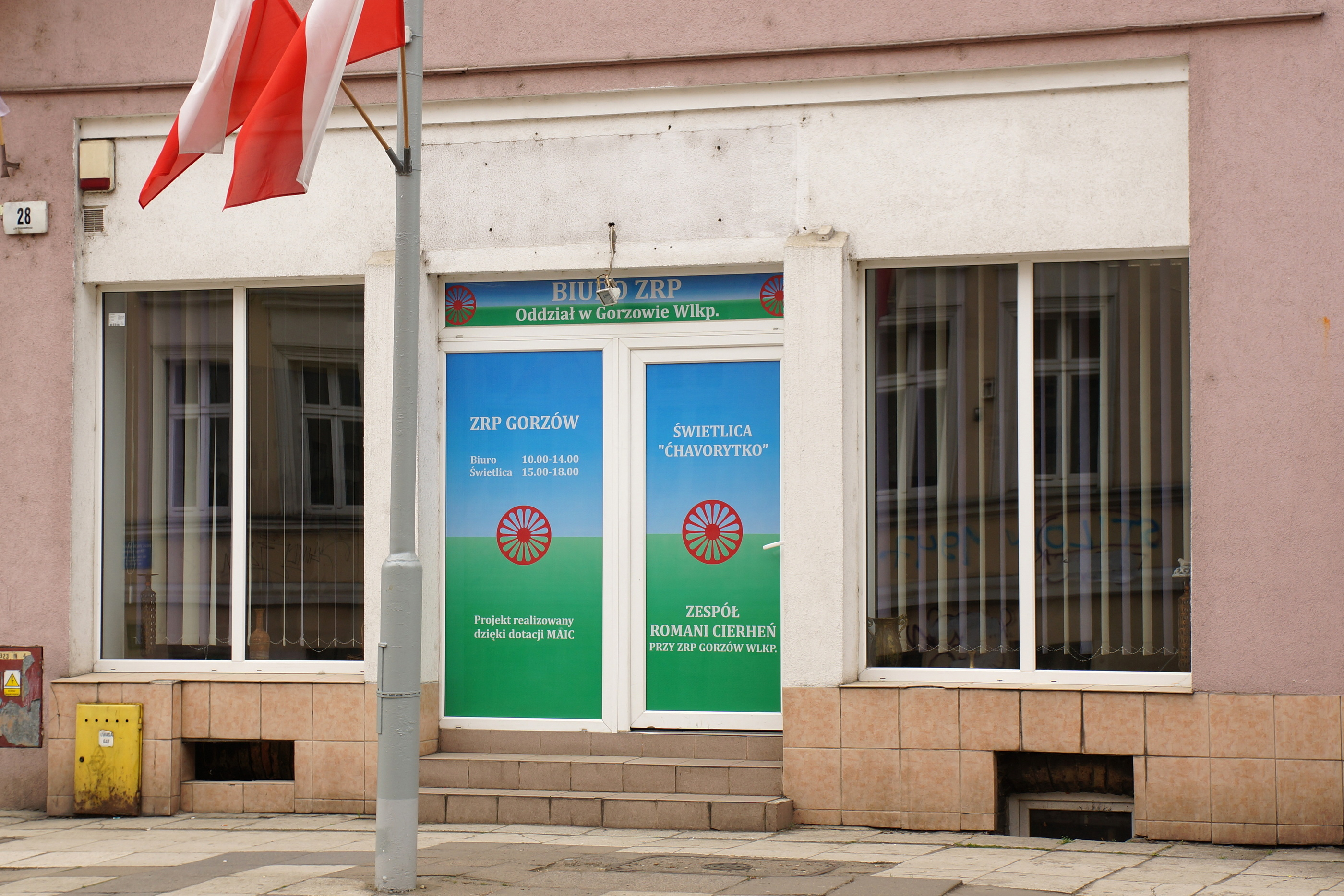 Gorzów Wlkp., ul. Chrobrego 28, biuro Związku Romów Polskich ze świetlicą "Ćhavorytko"